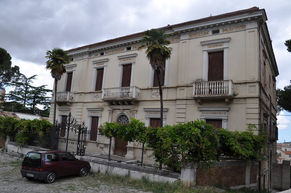 Palazzo Colesanti (1908-1911) a Larino.